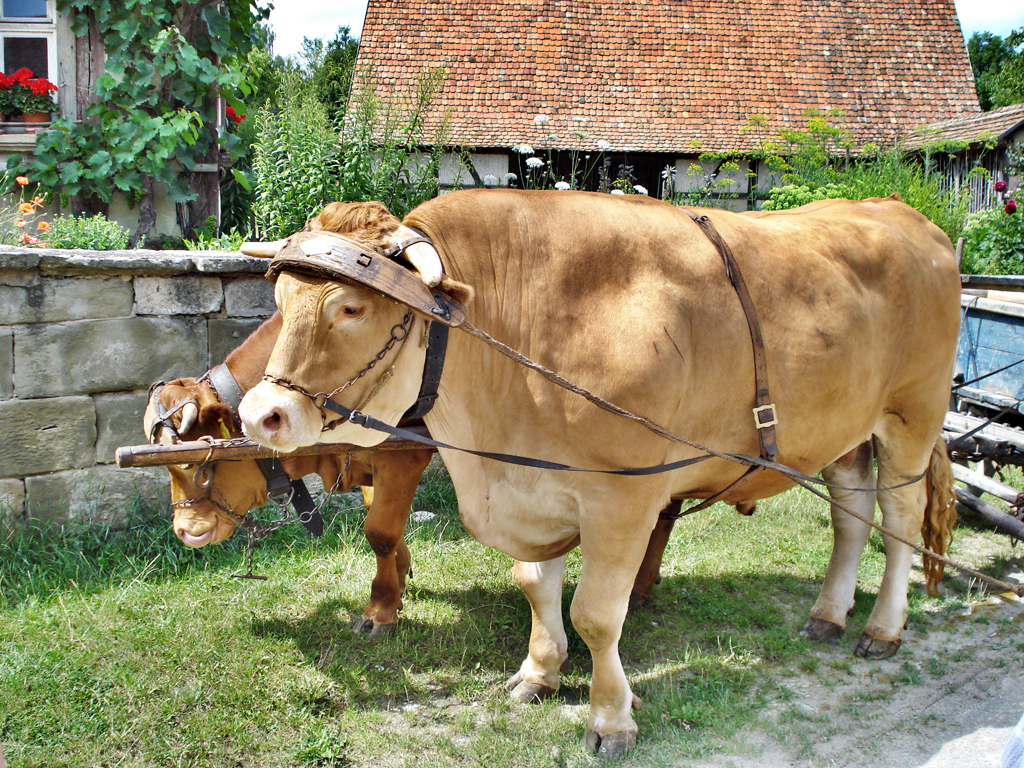 Ochsen mit Stirnjoch im Freilandmuseum Bad Windsheim